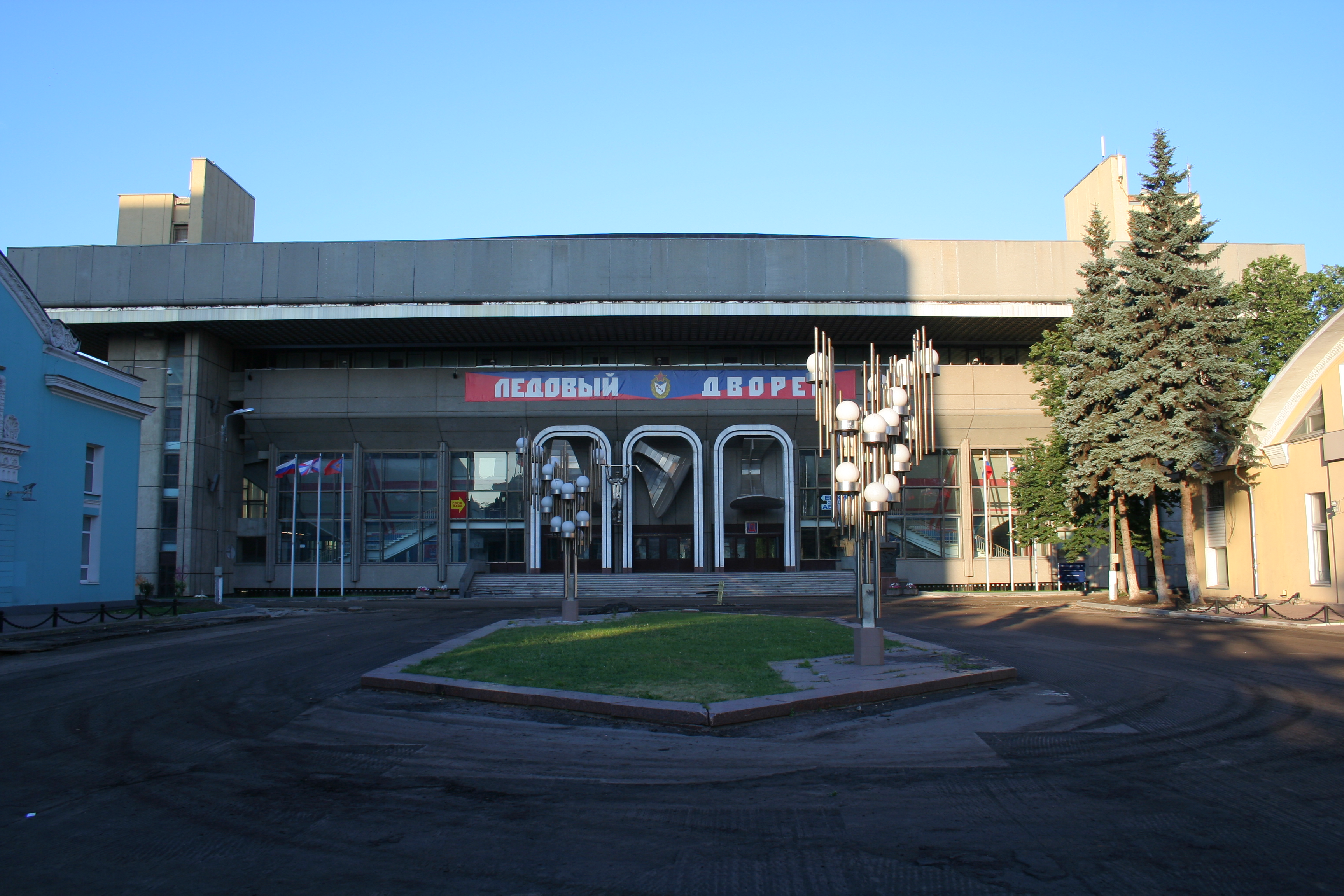 ZSKA-Sportkomplex in Moskau. Die Eissportarena.